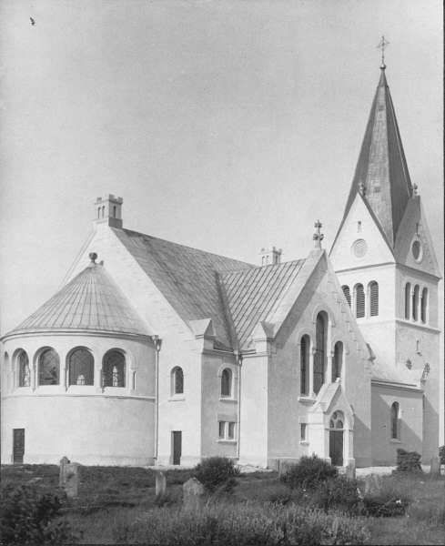 Kyrkan från nordöst. Kategori: (01) ExteriörerKyrkan från nordöst.